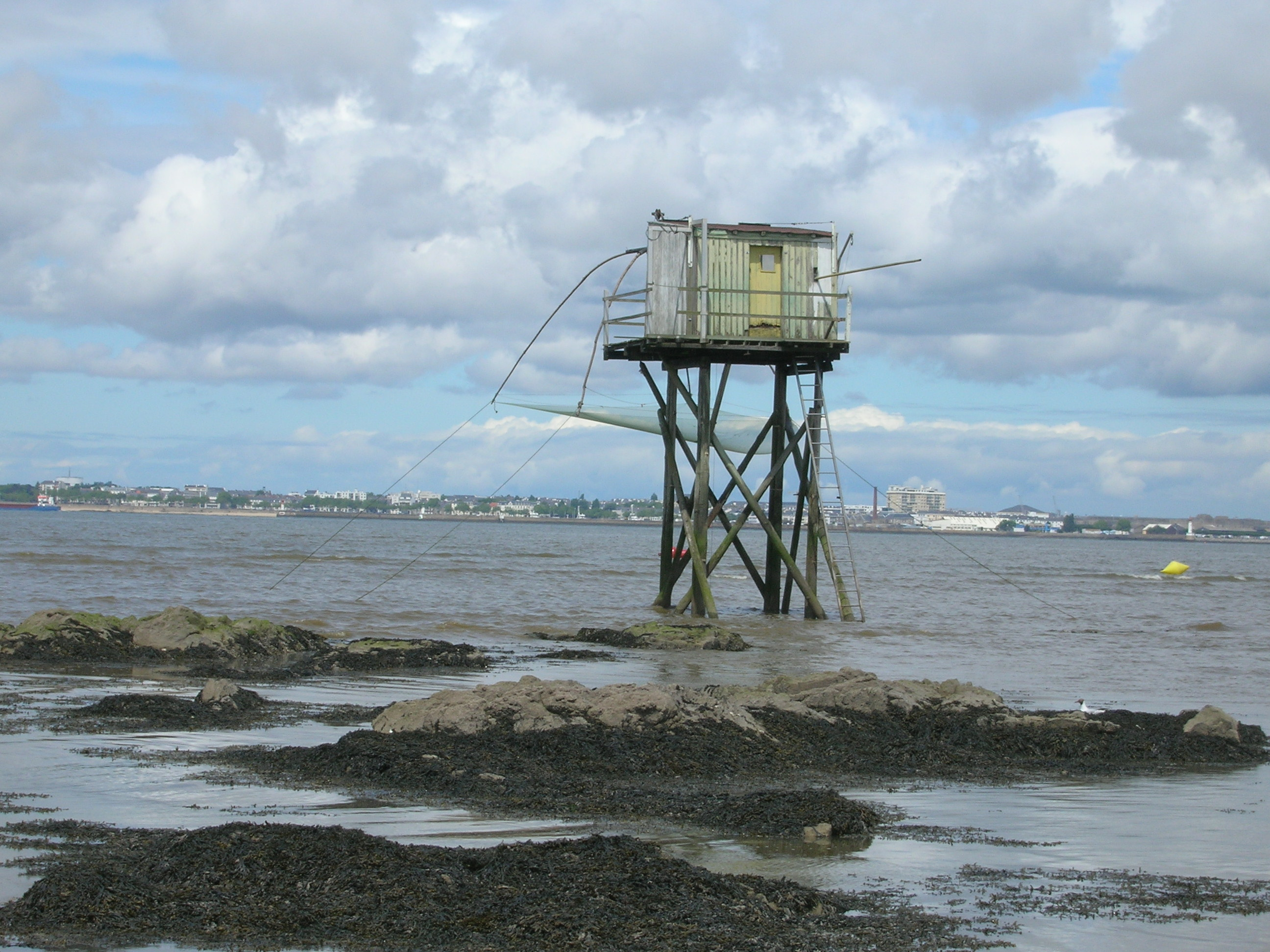 Une pêcherie au carrelet à Saint-Brevin-les-Pins